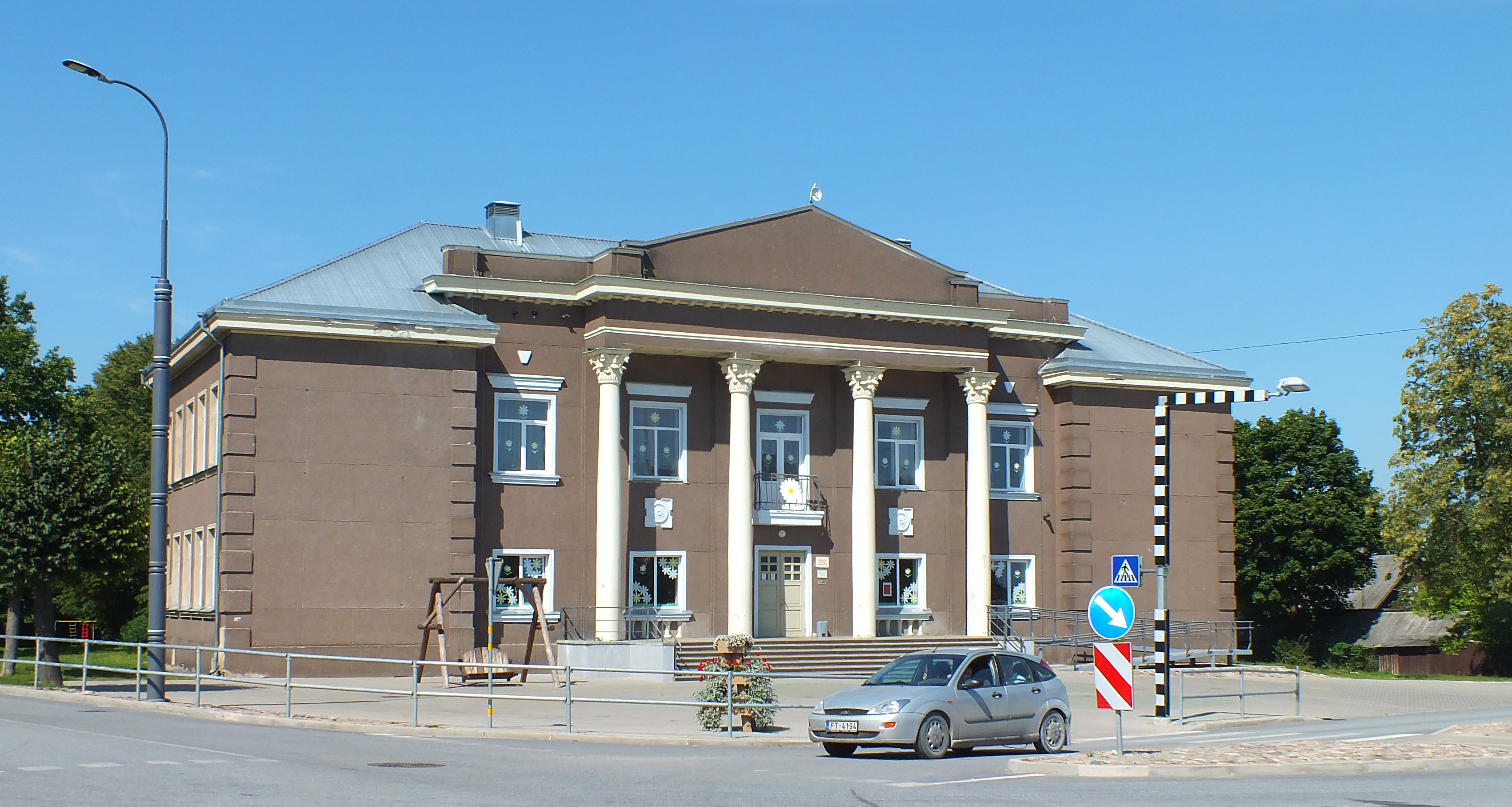 Kārsavas kultūras nams